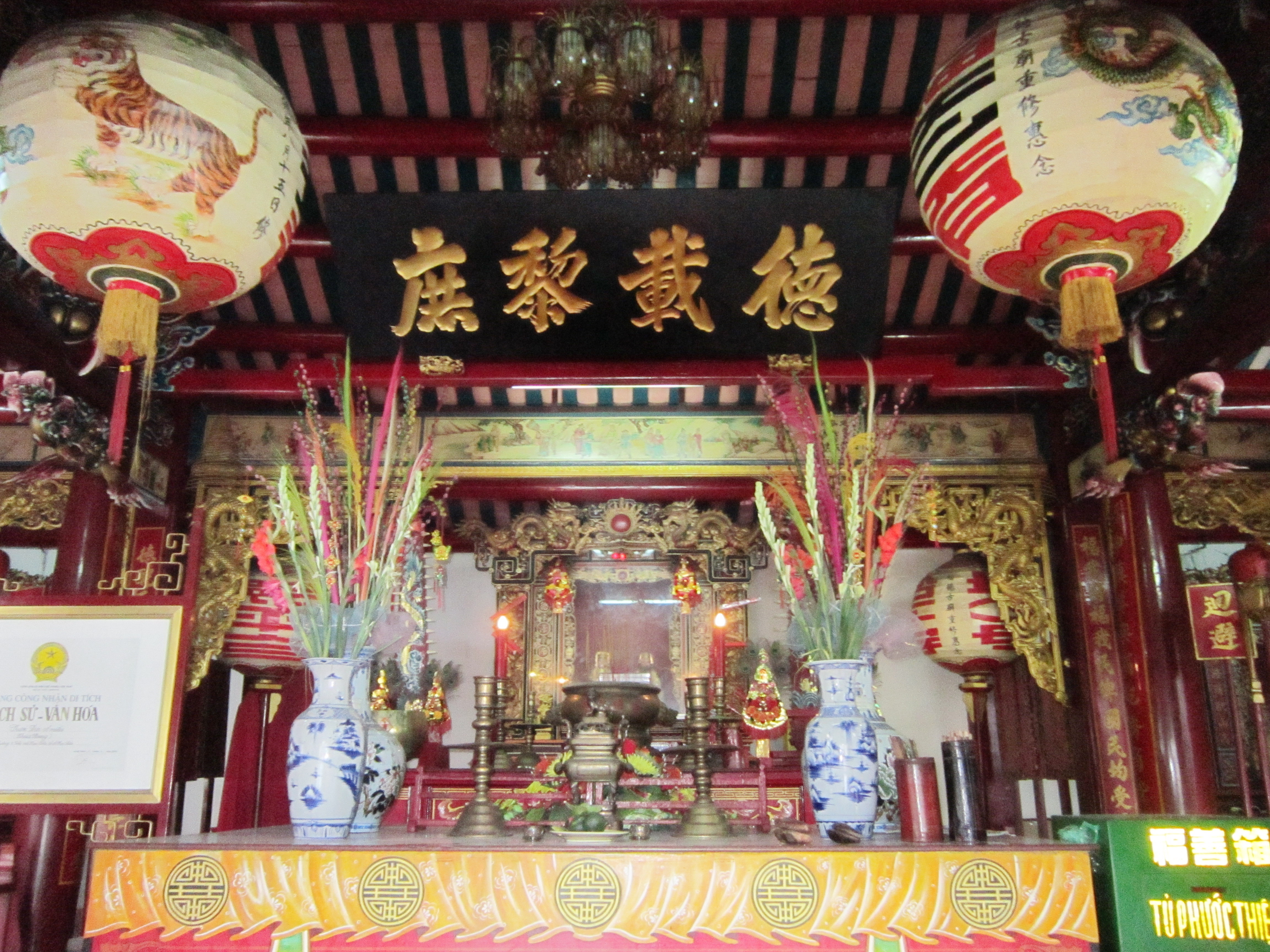 Bàn thờ Phước Đức chính thần trong chùa Bang; hiện tọa lạc tại số 74 đường Điện Biên Phủ, thuộc phường 3, thành phố Bạc Liêu, tỉnh Bạc Liêu, Việt Nam.